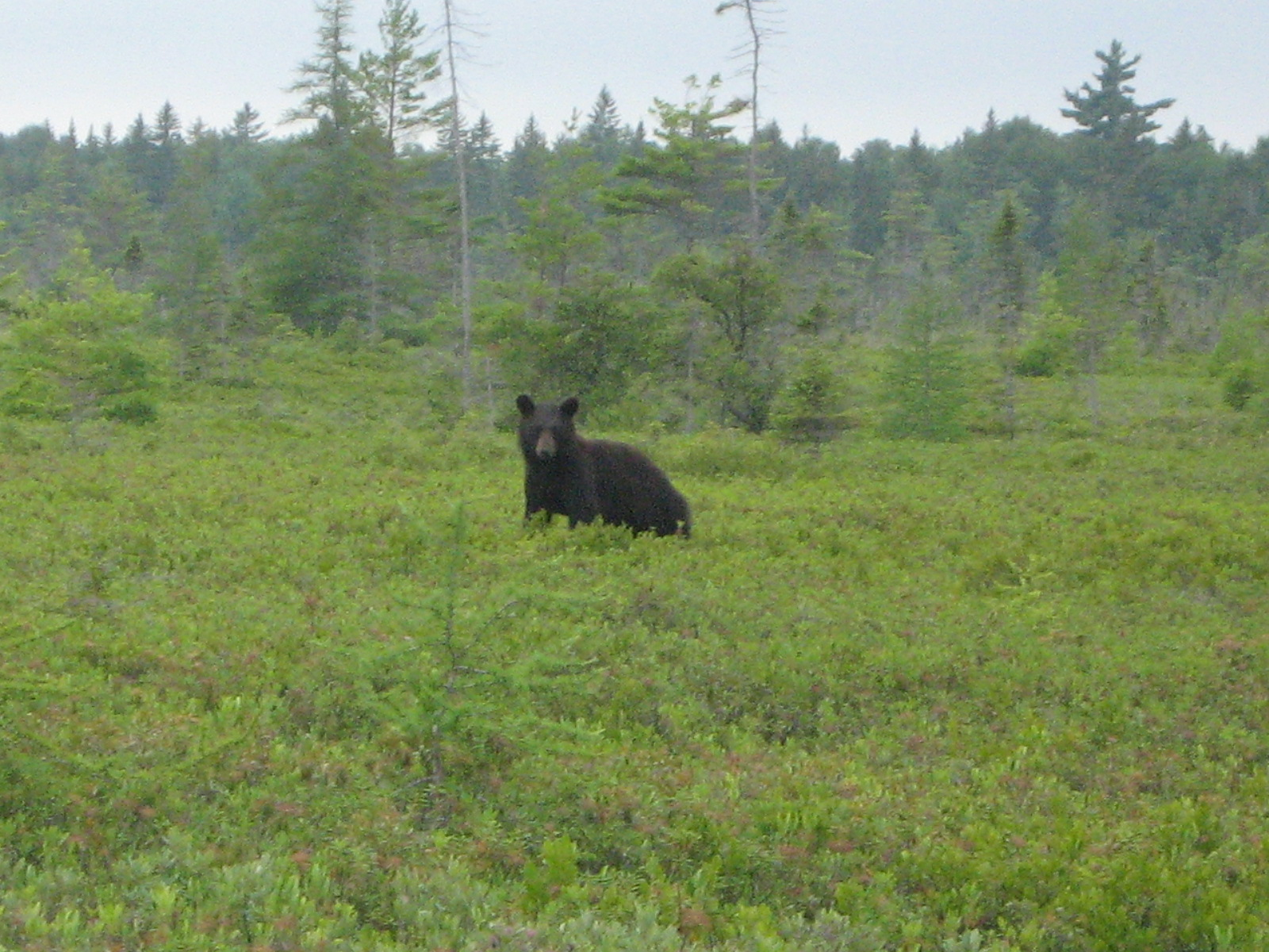 Ours noir (Ursus americanus) vu sur le sentier La Tourbière dans le parc national de Kouchibouguac